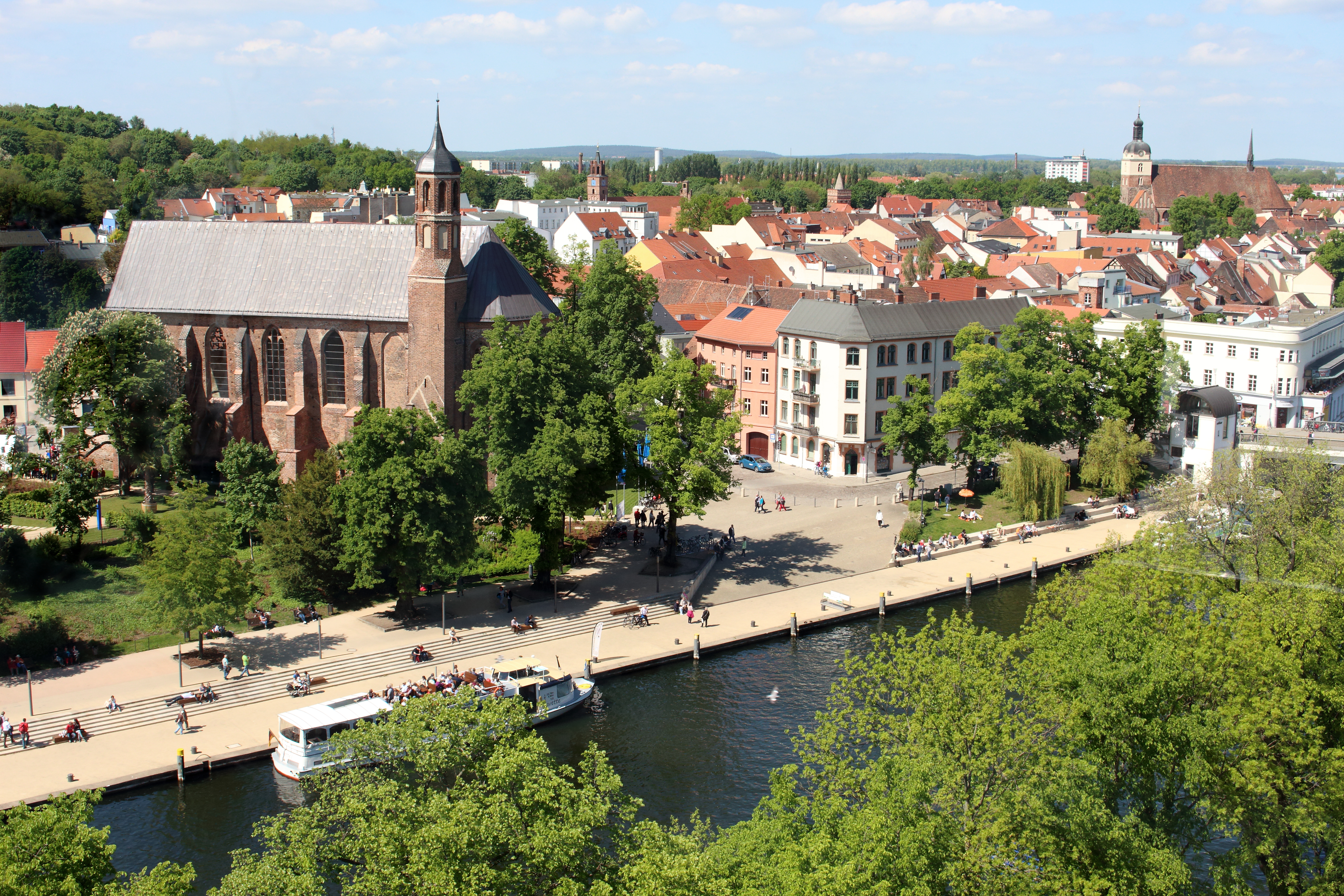 Jahrhundertbrücke in Brandenburg an der Havel vom Skyliner während der BUGA 2015